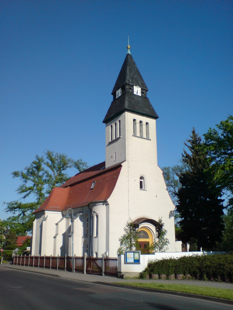 Die Kirche von Mölkau im Leipziger Ortsteil Zweinaundorf.